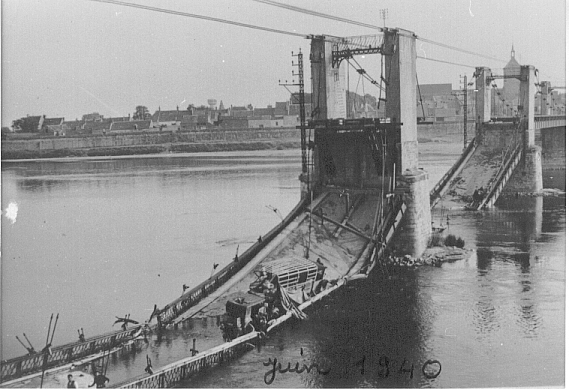 Jargeau, le pont suspendu après les bombardements italiens durant la Seconde Guerre mondiale. La rupture des câbles suspenseurs et des haubans de solidarité entraîna l'effondrement des deux travées rive droite (côté Saint-Denis-de-l'Hôtel).